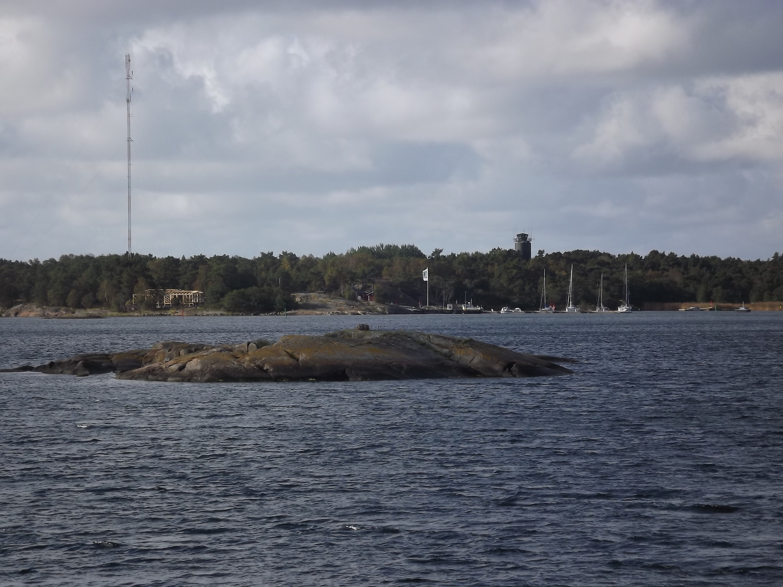 Örö gästhamn sedd från inloppet. Eldledningstornet syns bakom båtarna. Sugtömningsapparat för septiktankar anas längst till höger.